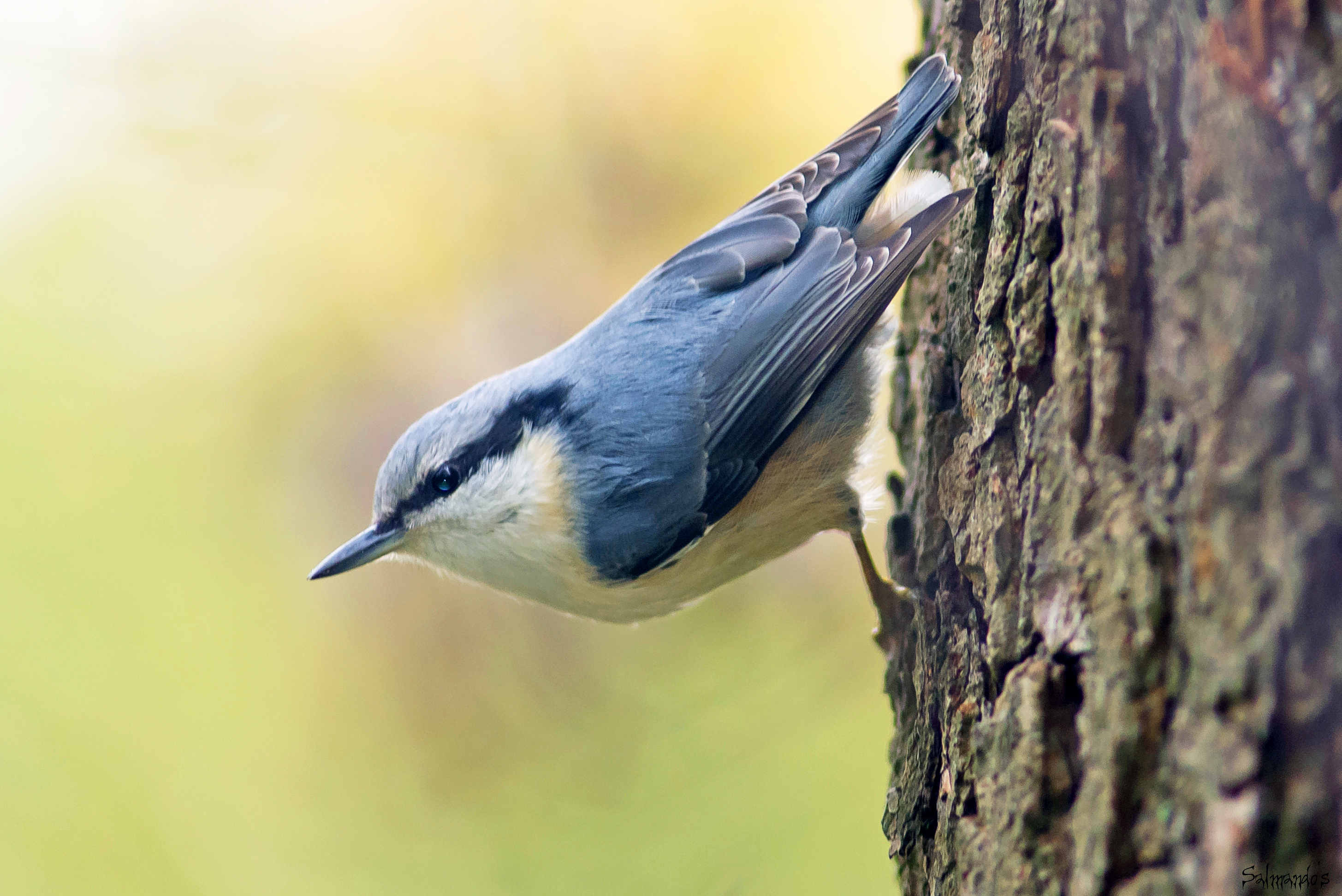 Sitta europaea europaea, Kotka, Finland